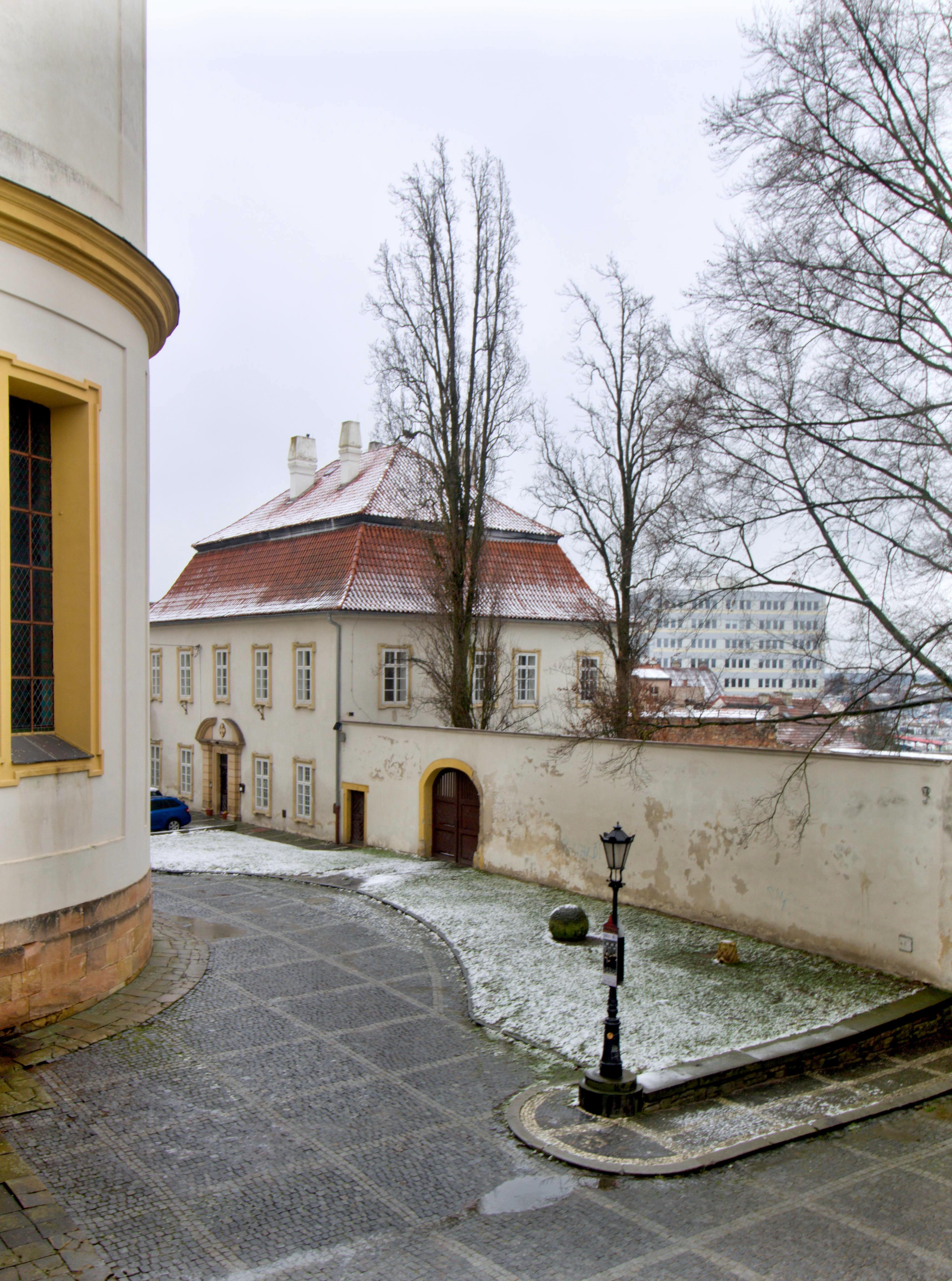 Jičínská farnost-děkanství u kostela svatého Jakuba Většího